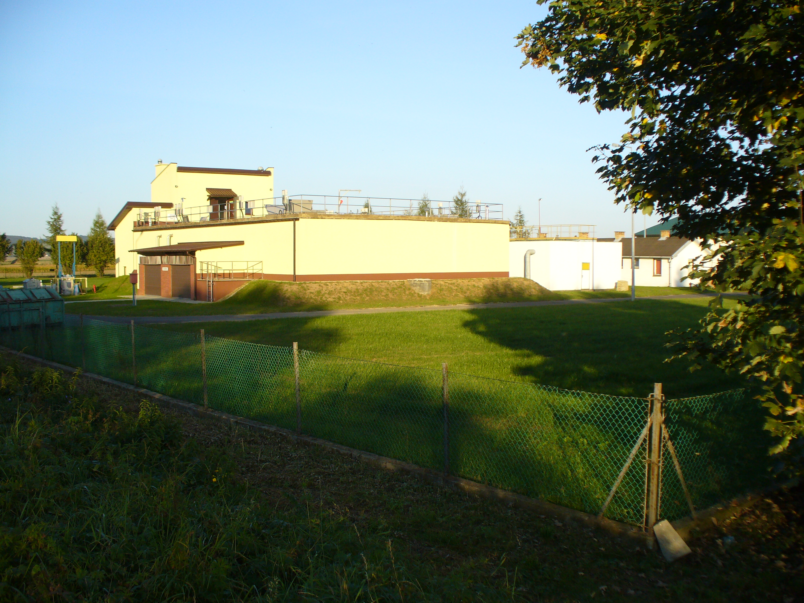 Besko - oczyszczalnia sciekow